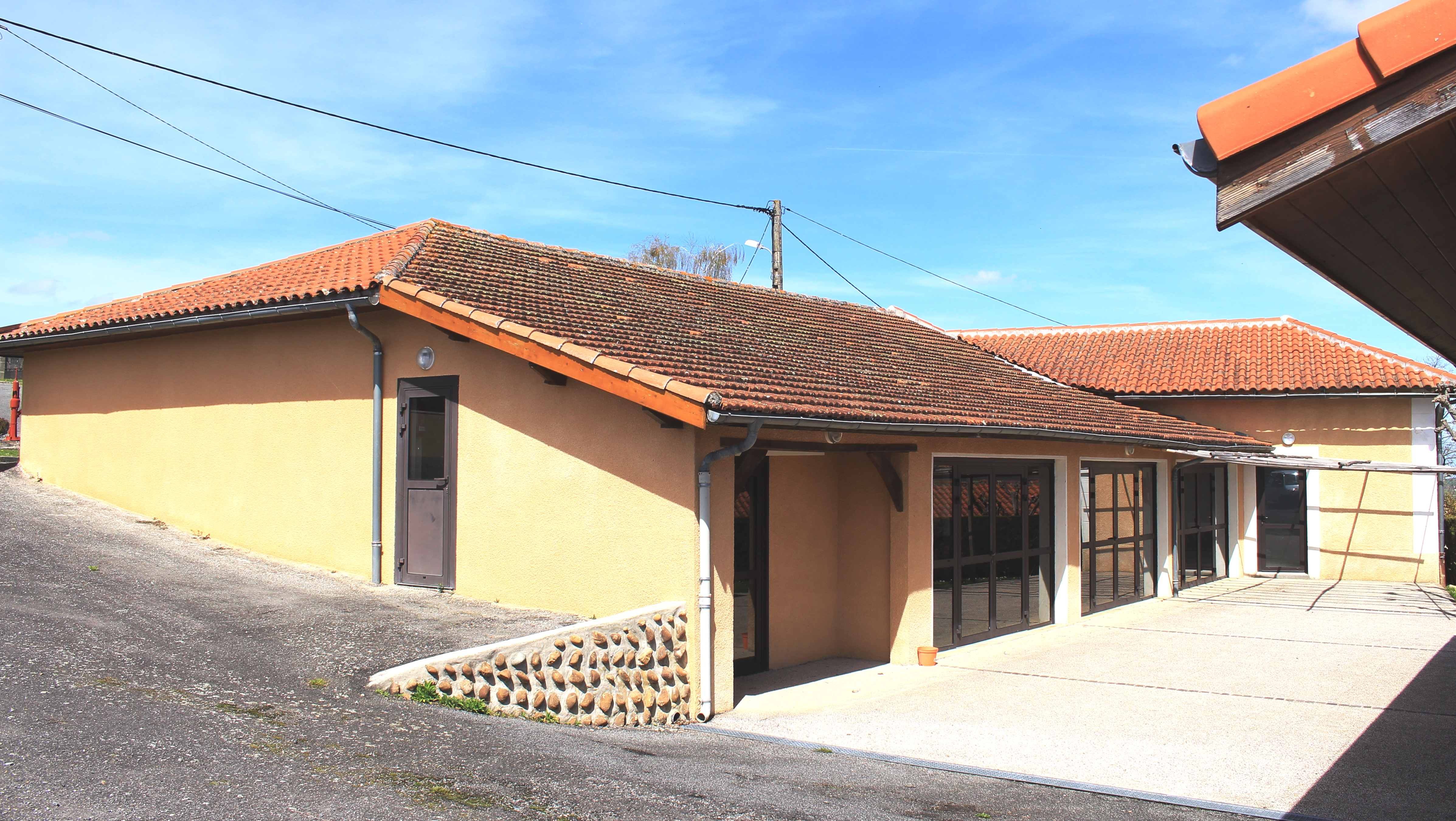 Salle des fêtes de Libaros (Hautes-Pyrénées)